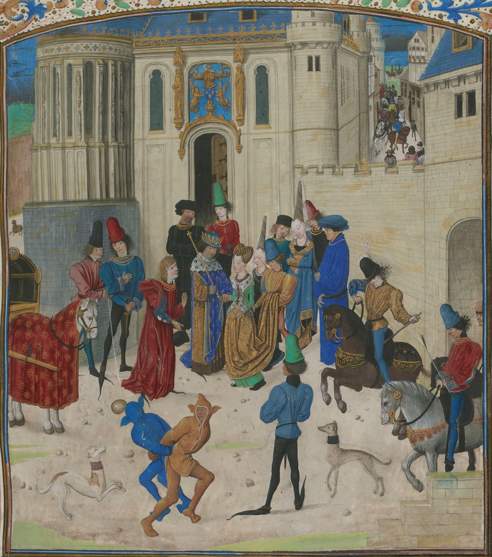 Isabela Bavorská a Karel VI.